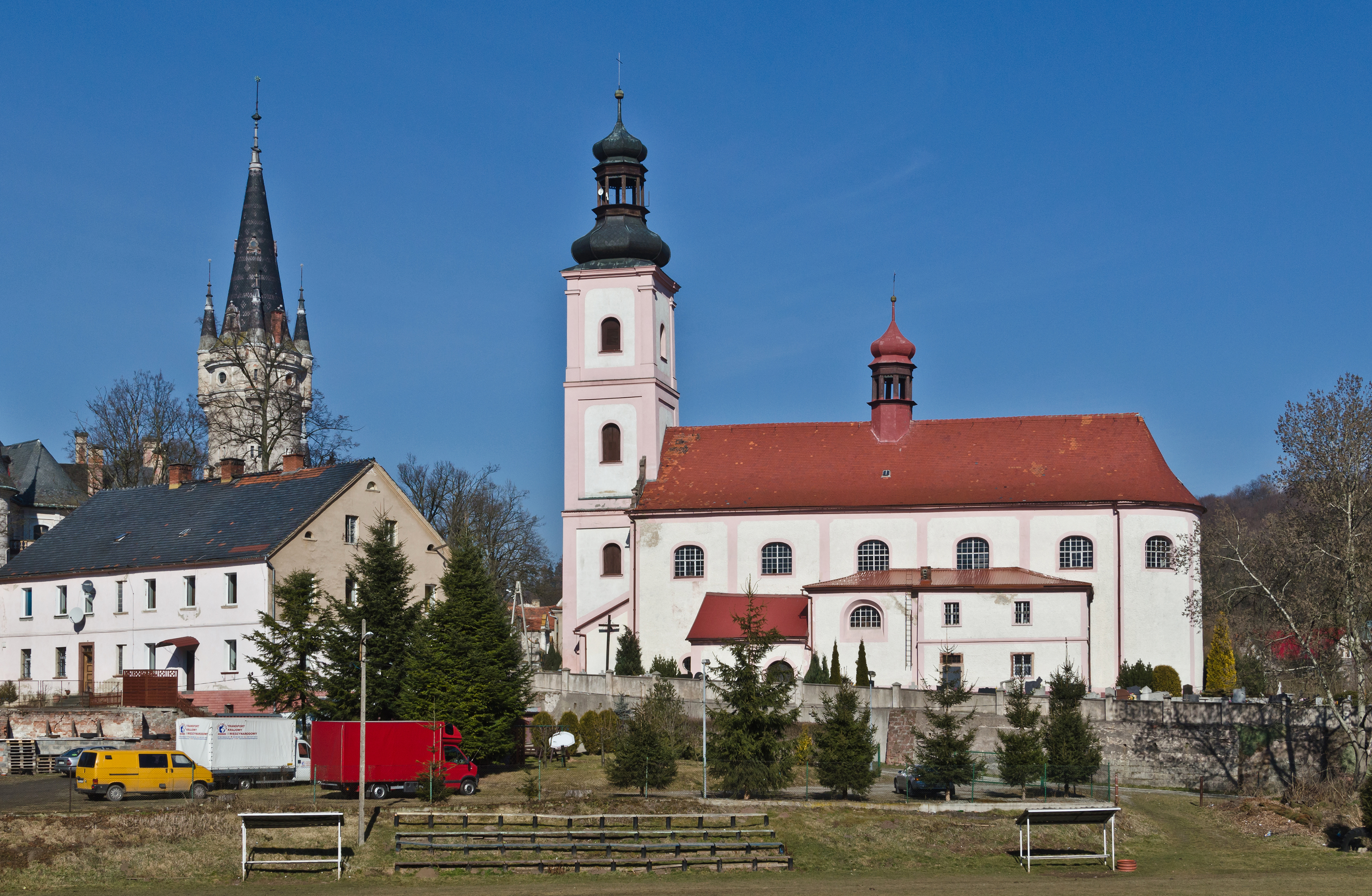 Bożków, kościół par. p.w. śś. Piotra i Pawła, XVII, 1708